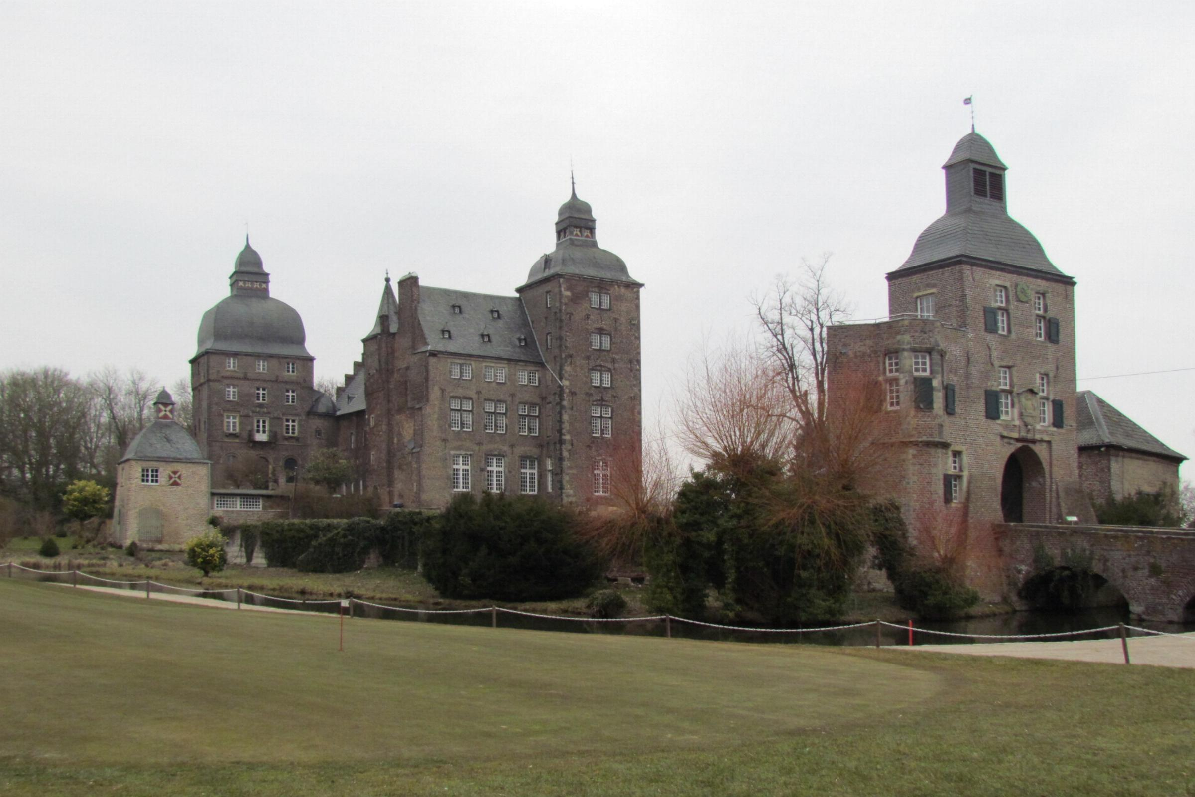 Wassermühle in der Stadt Korschenbroich